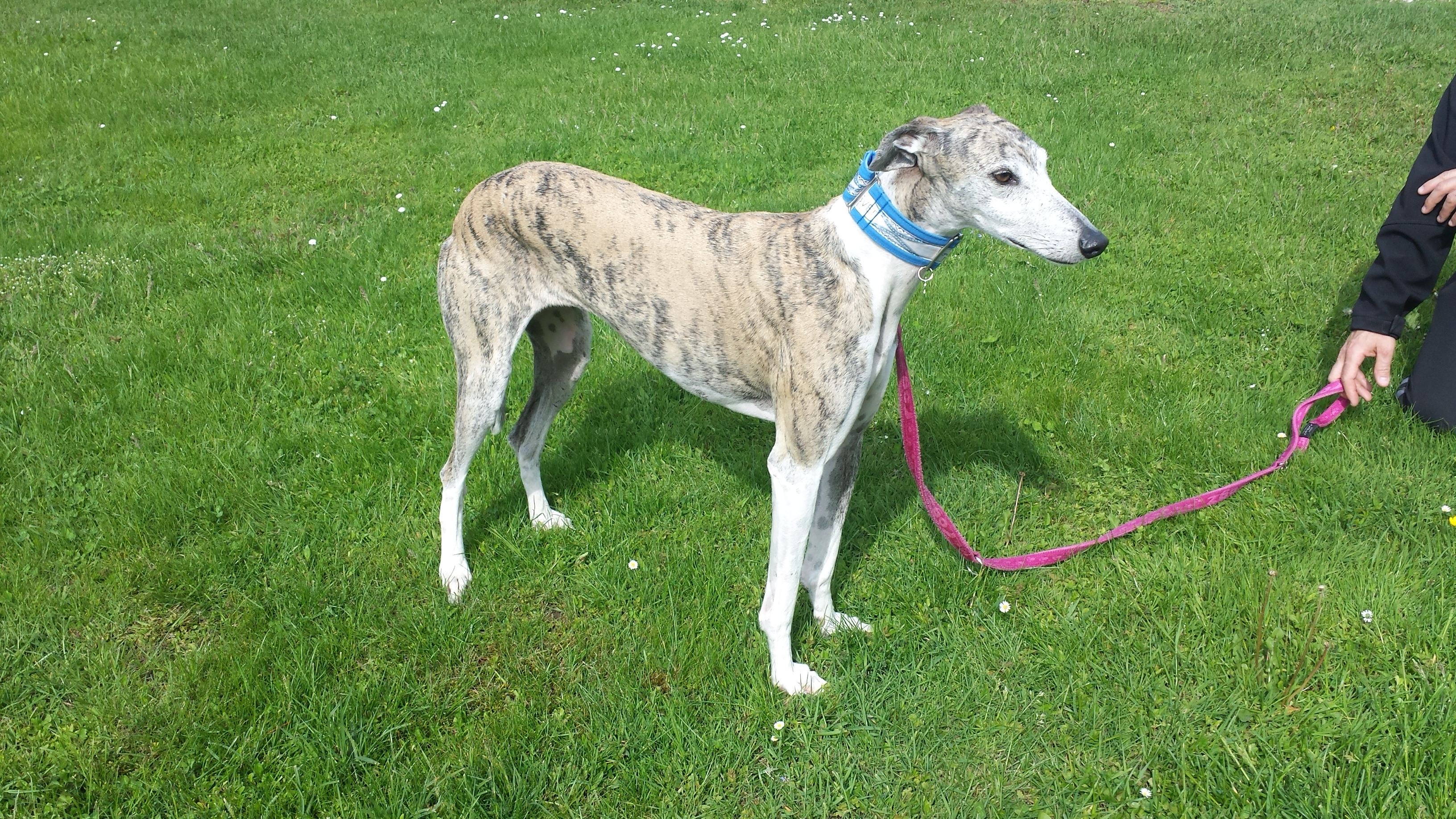 Galgo, Španski hrt - 2017 05 07